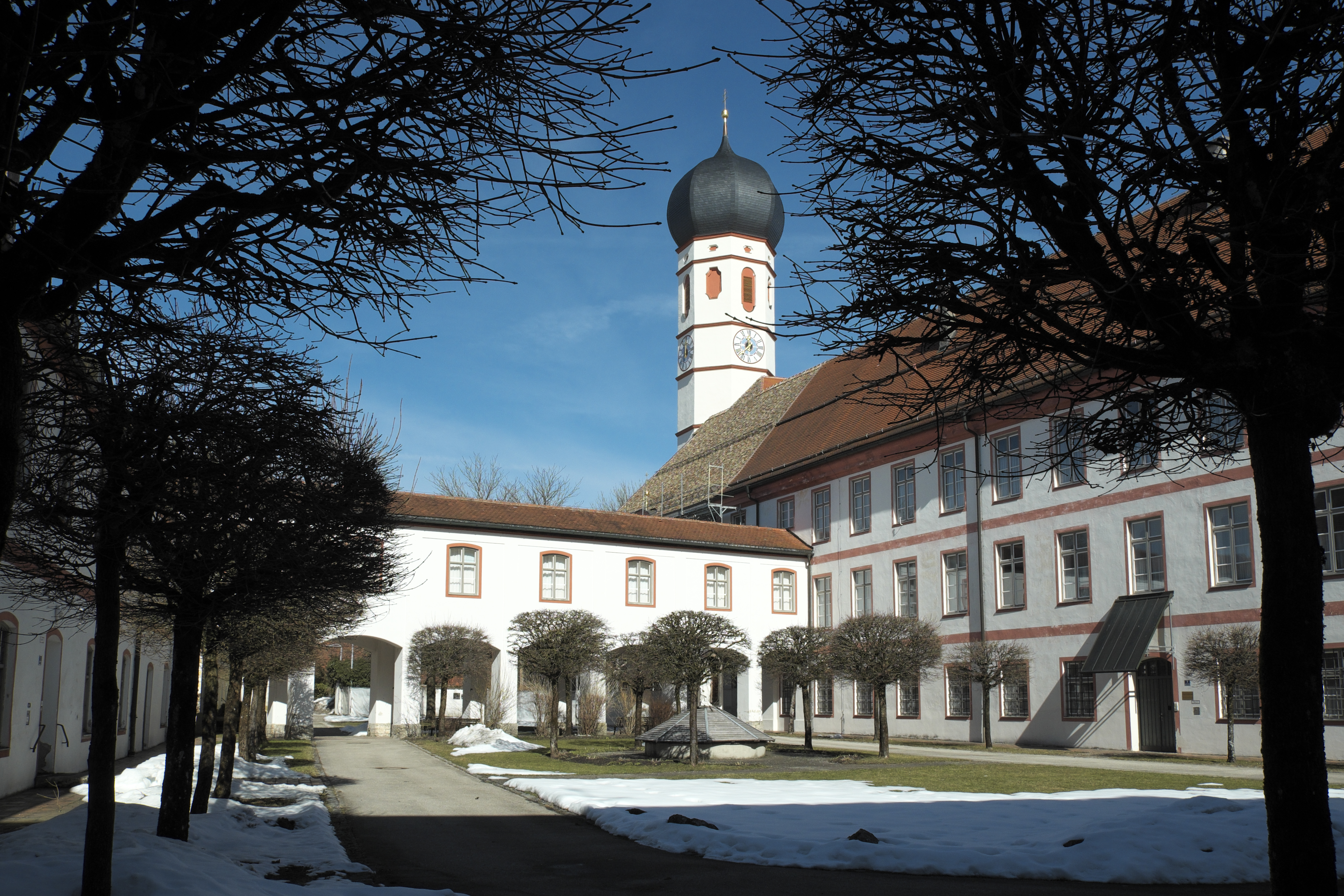 Kloster Beuerberg in Beuerberg, einem Ortsteil von Eurasburg im Landkreis Bad Tölz-Wolfratshausen (Bayern/Deutschland)